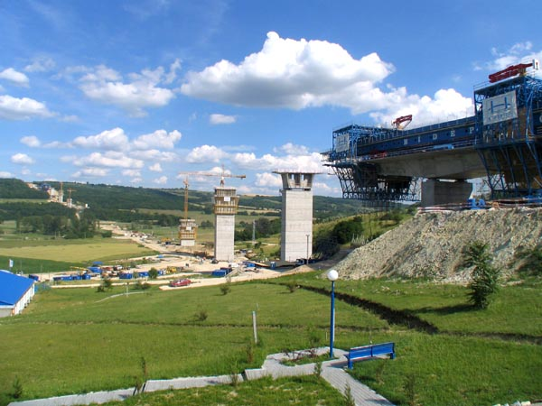 Kőröshegy, völgyhíd. A képet magam készítettem (2005 júlisában) Bp